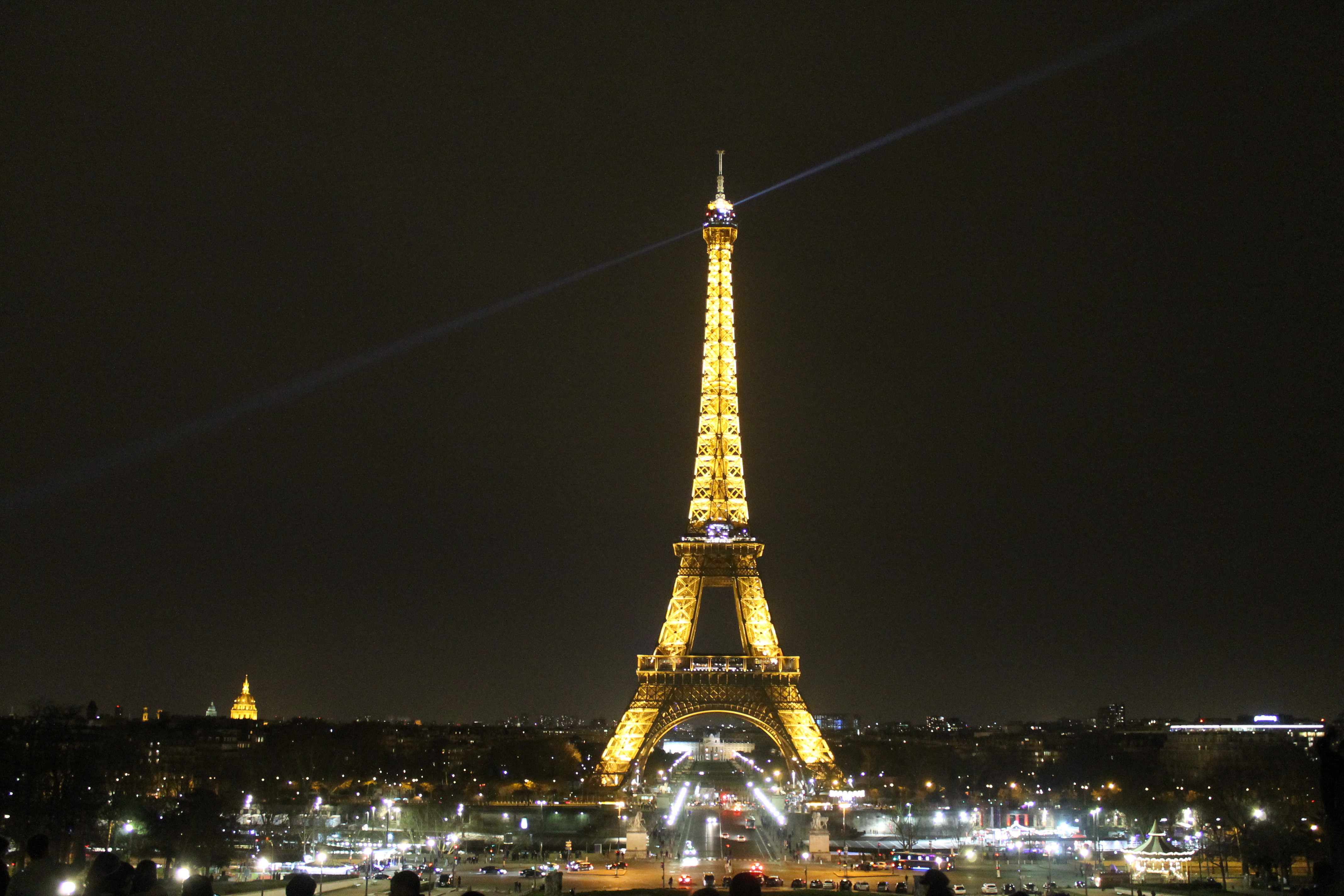 Tour Eiffel vue de nuit